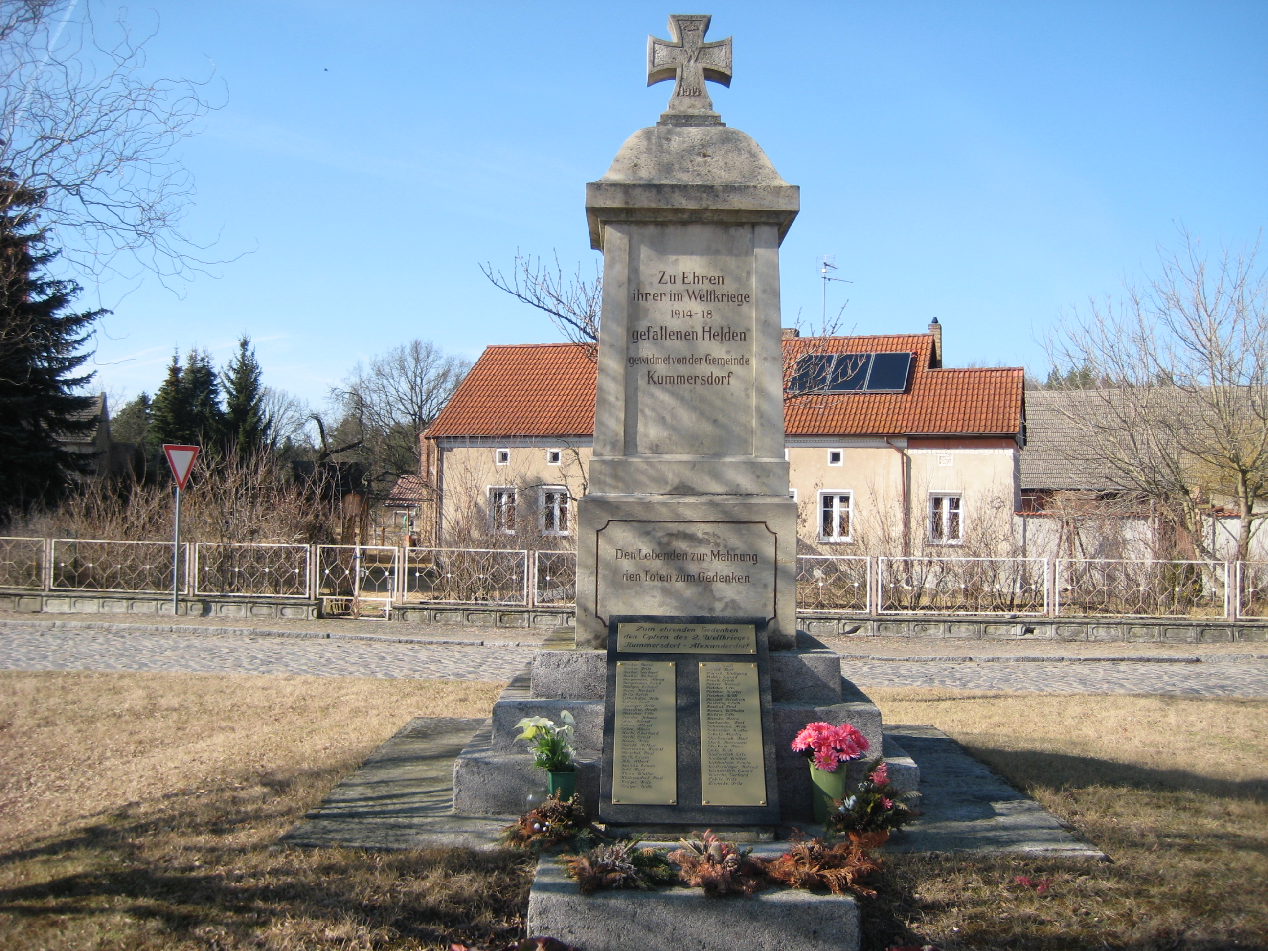 Denkmal für die Gefallenen des 1.Weltkrieges Kummersdorf-Ort